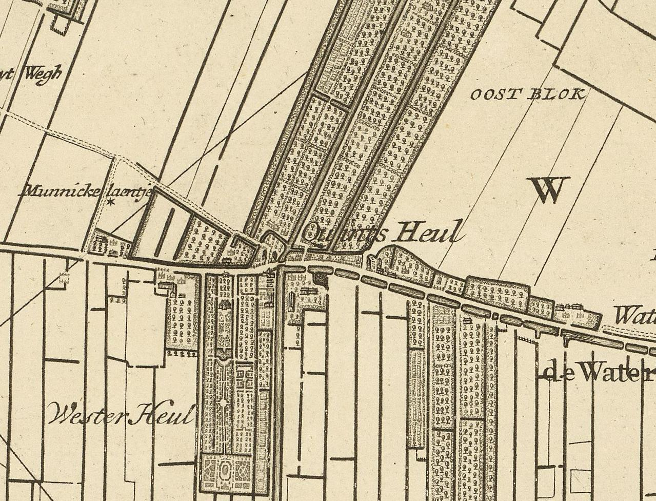 Kaart van het hoogheemraadschap van Delfland, gemeten door de landmeters Nicolaas en Joacobus Kruchius. Afgebeeld is Kwintsheul, Zuid-Holland